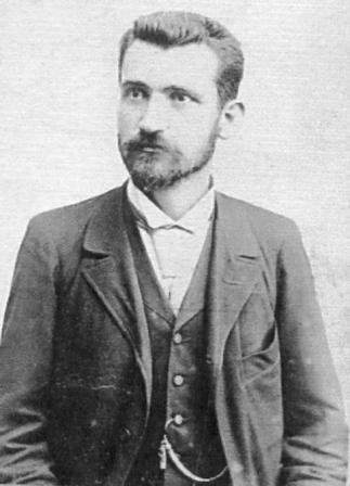 Димитрије Ј. Путниковић (1859-1910), када је имао 40 година. Пренето из књиге:Путниковић, Драгољуб М.; Јевтић, Бојана М. (2007). Библиографија радова Димитрија Ј. Путниковића (на ((sr))). Београд: Педагошки музеј. ISBN 978-86-82453-03-1.